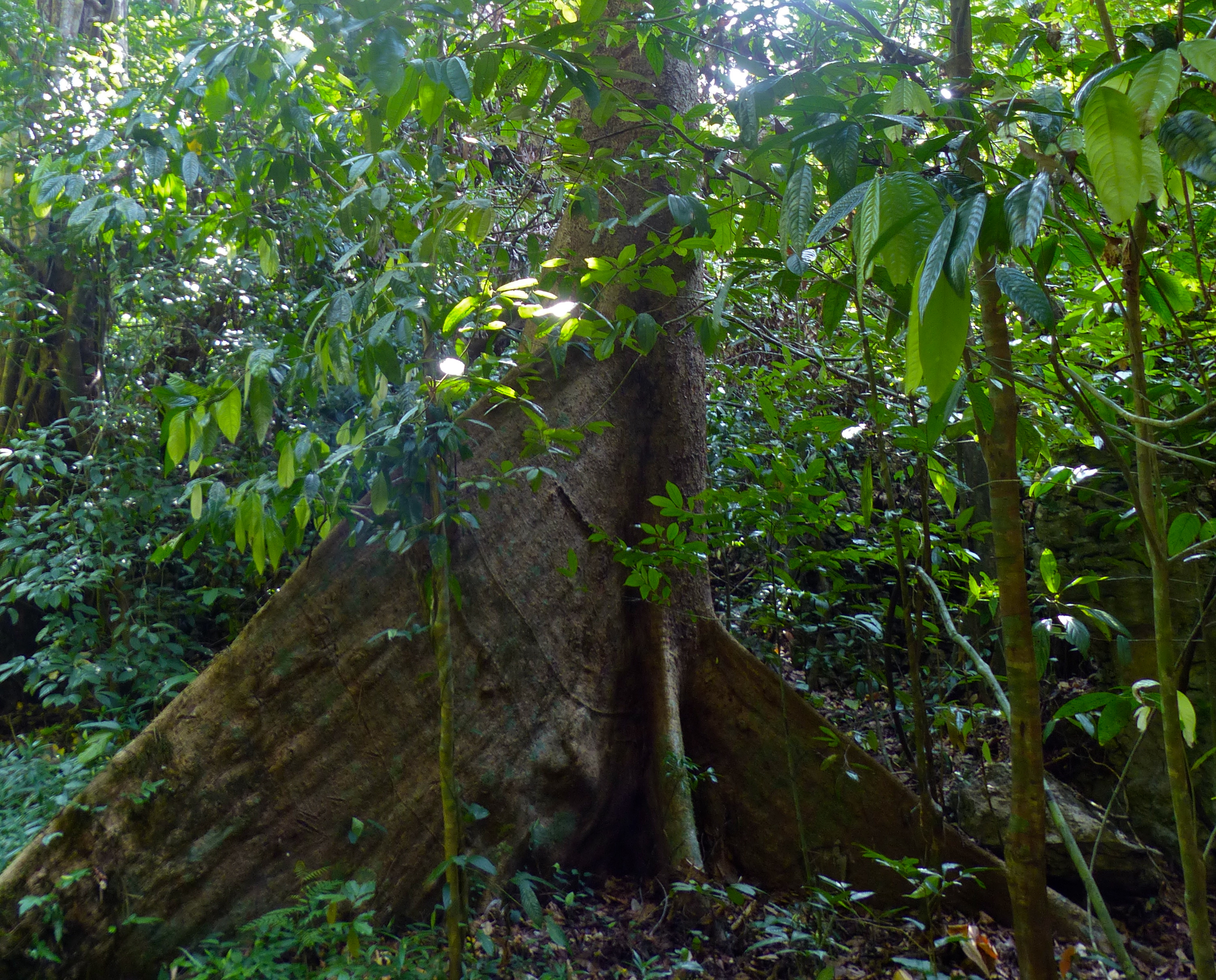 Niah NP, Sarawak, MALAYSIA